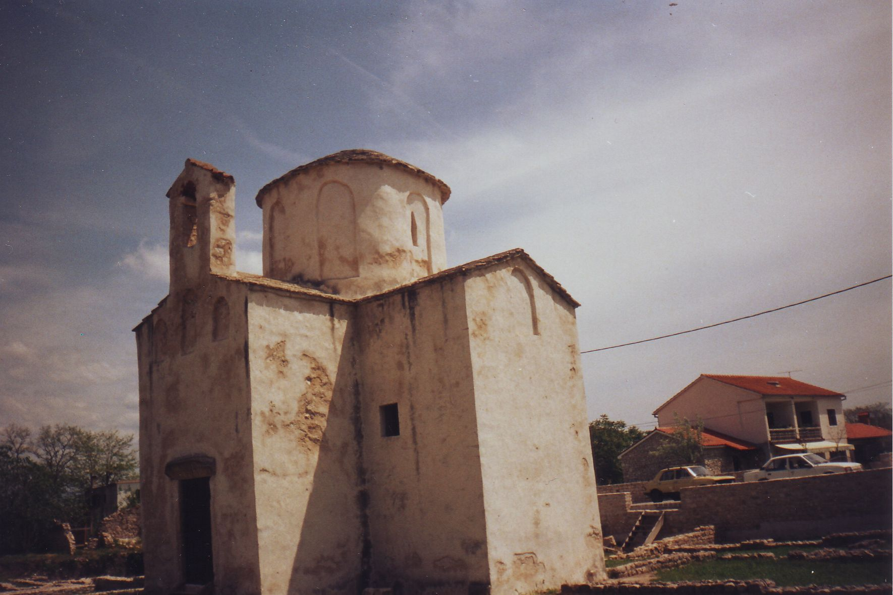 Church Sv. Kriz in Nin